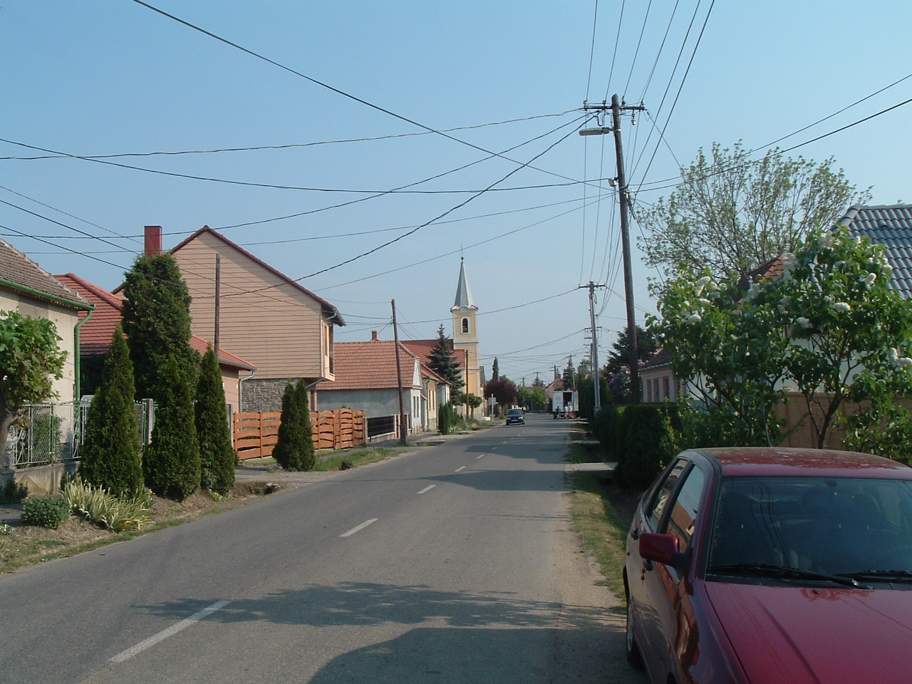 Gyöngyösfalu, Main Street